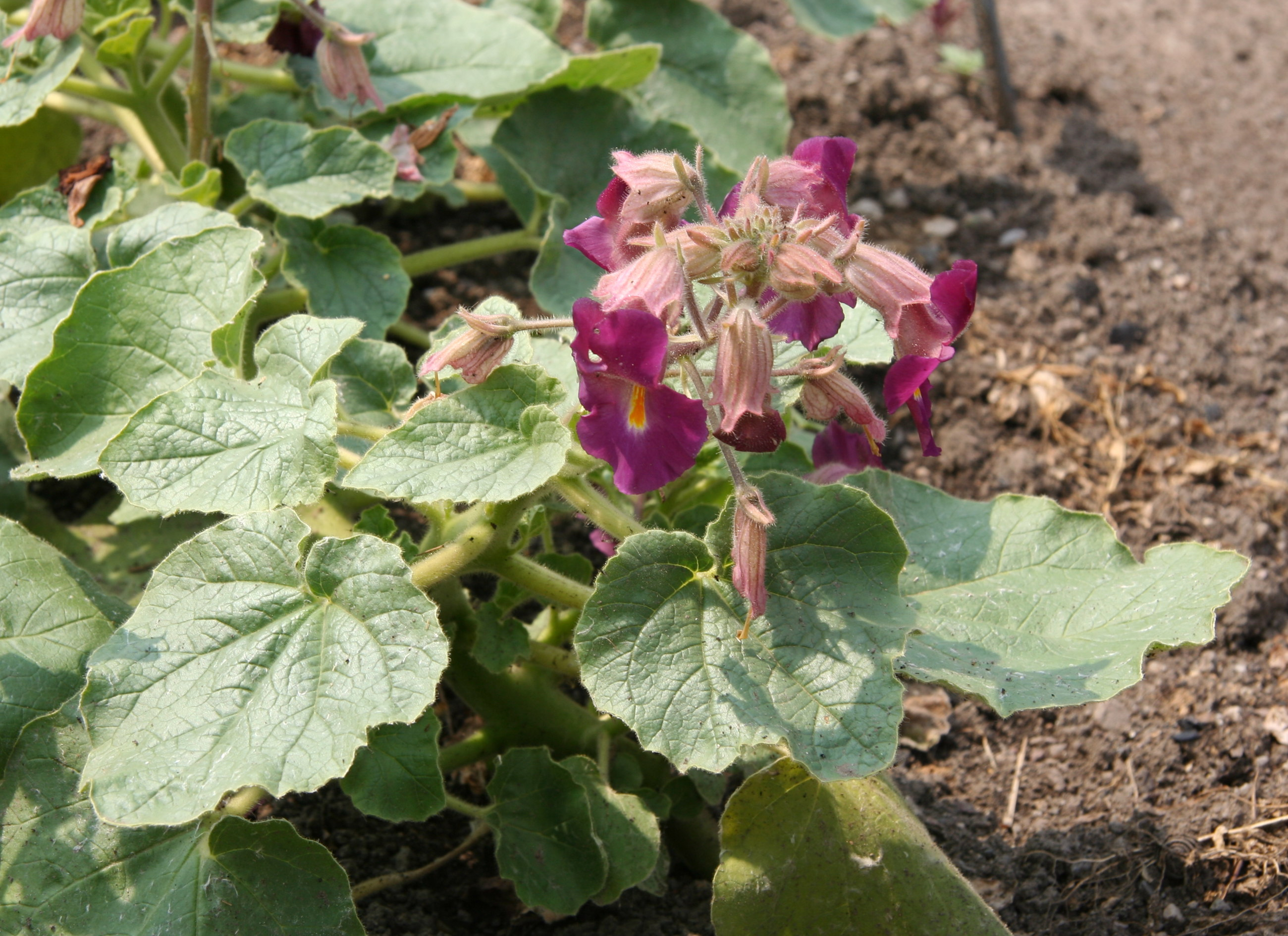 Proboscidea fragrans im Botanischen Garten Dresden